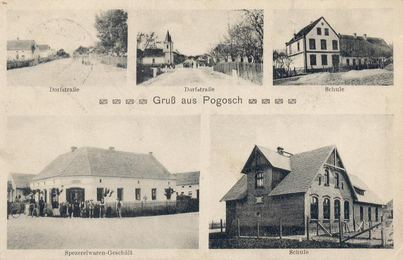 Widokówka z Pogórza przedstawiająca widoczki ze wsi, w tym budynki starej i nowej szkoły oraz sklep.